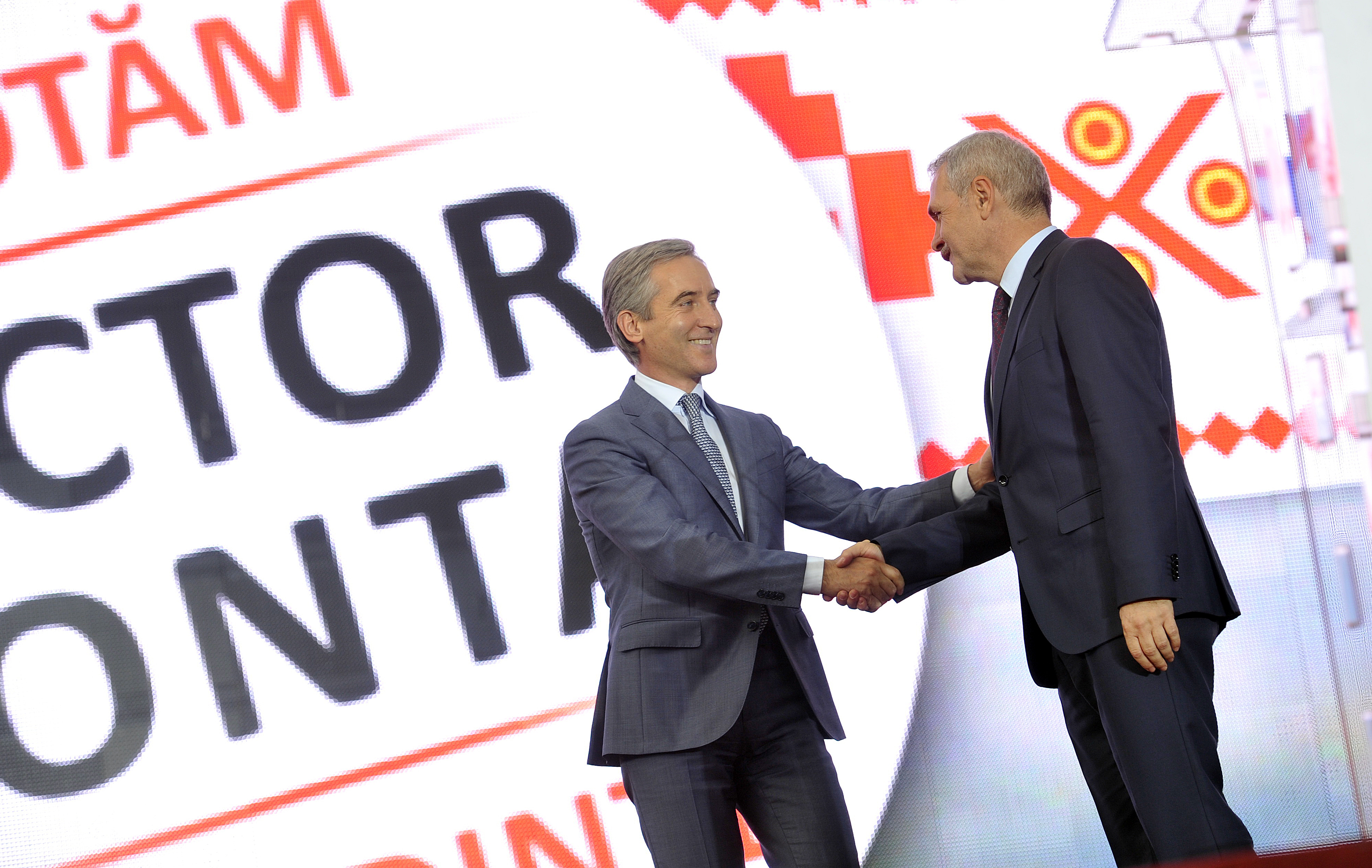 Lansarea candidaturii lui Victor Ponta la alegerile prezidentiale din 2014 - 20.09 (21)